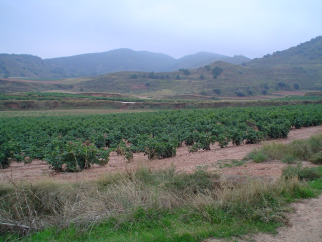 Paisaje de Ventosa (La Rioja). España